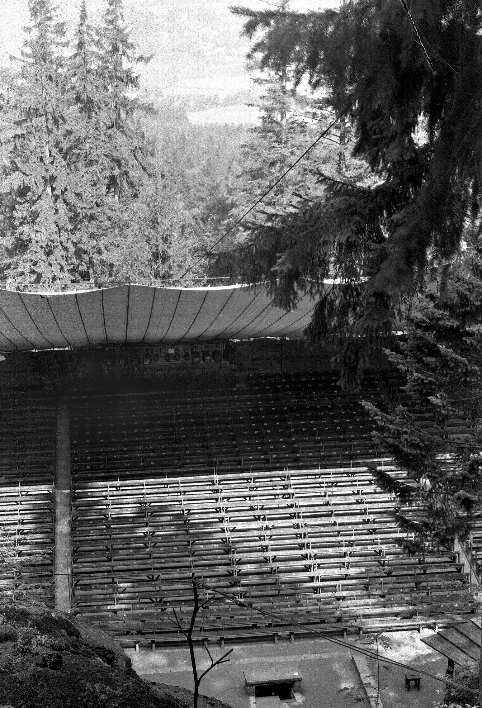 Luisenburgbühne Zuschauerraum vor dem Umbau 1970